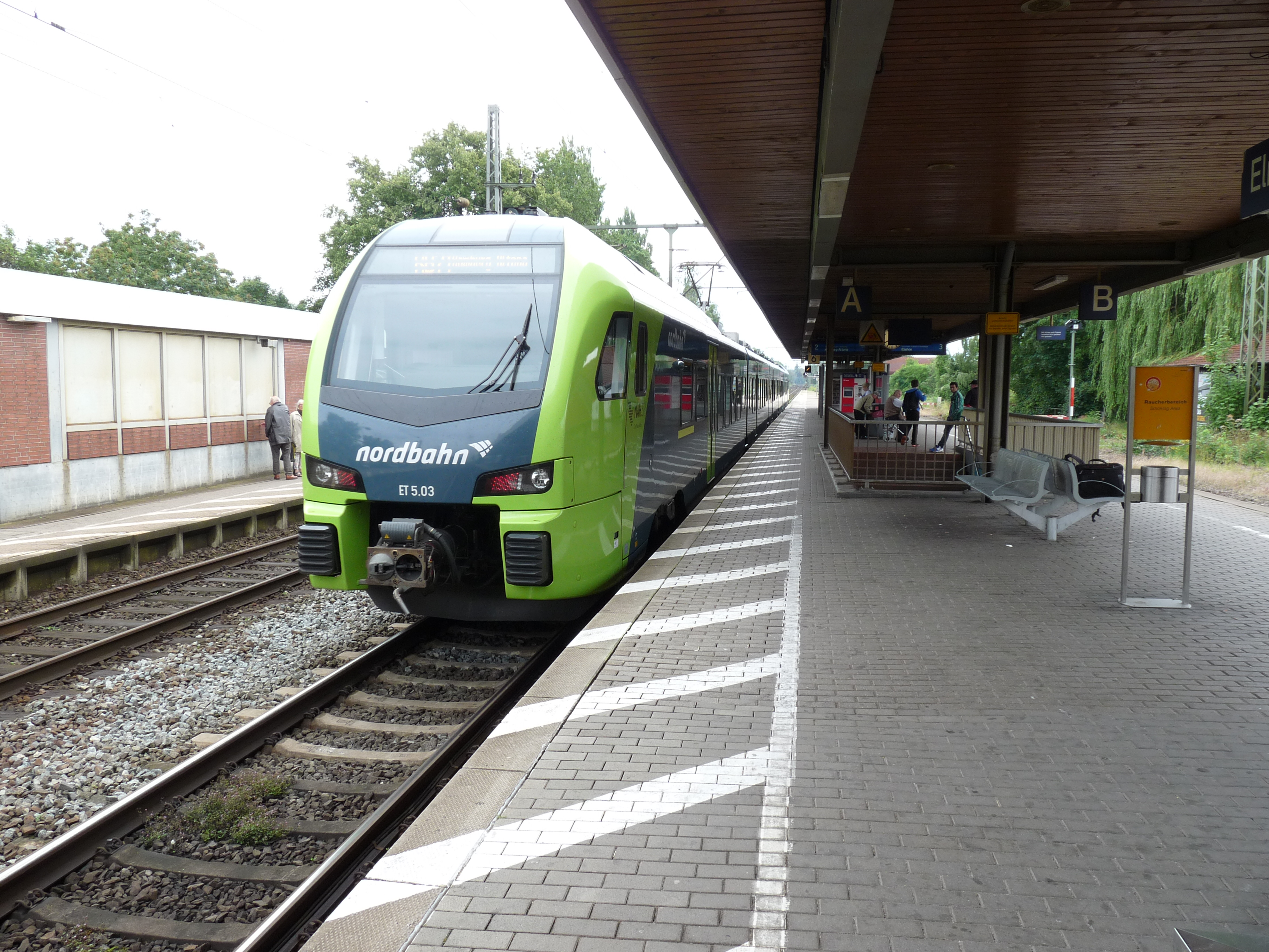 Nordbahn trein in Elmshorn